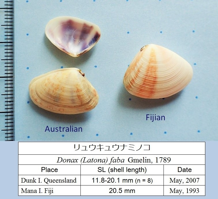 オーストラリアのダンク島とフィジーのマナ島でひろったリュウキュウナミノコと思われる貝殻